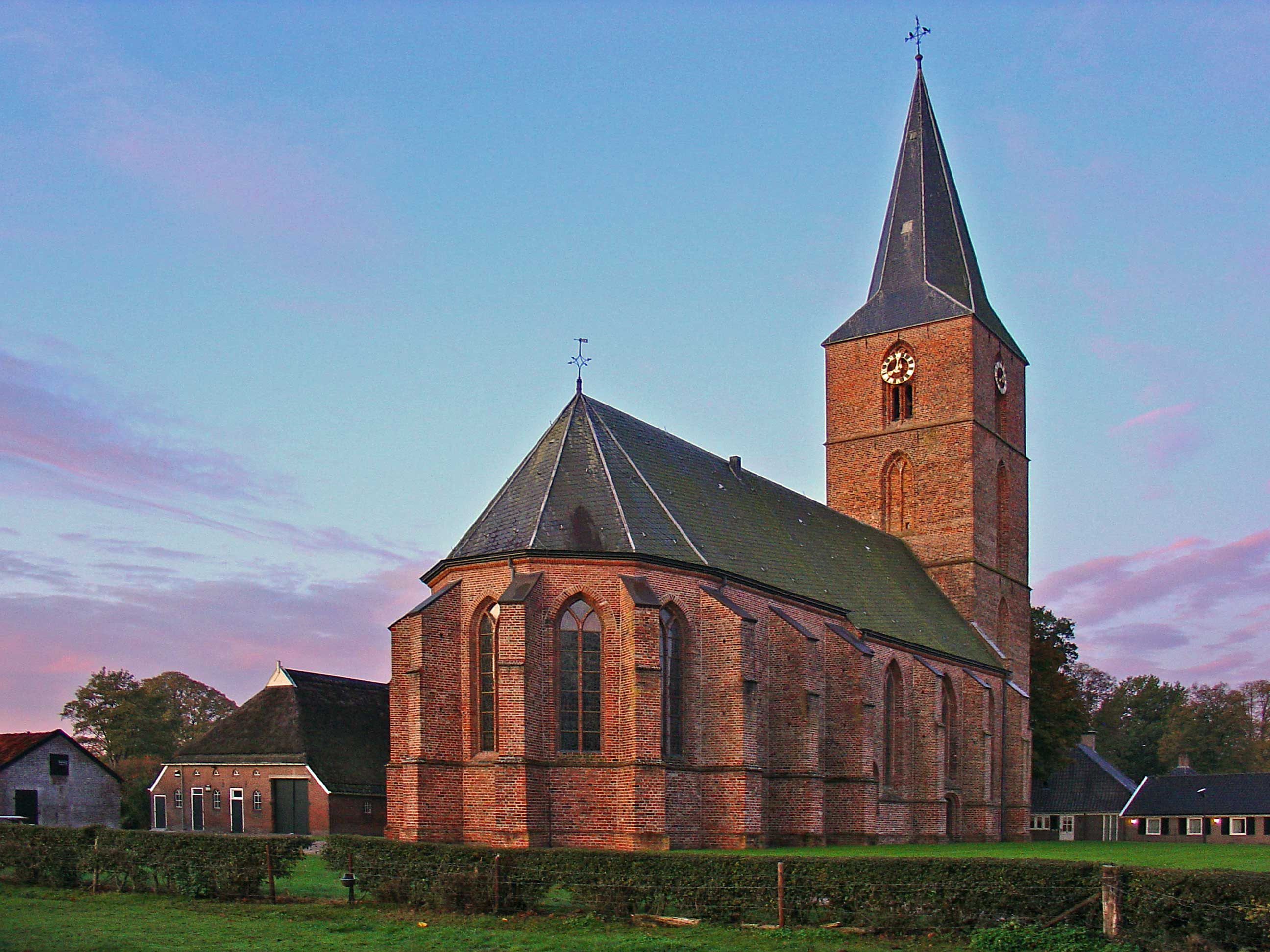 Jacobuskerk van Rolde